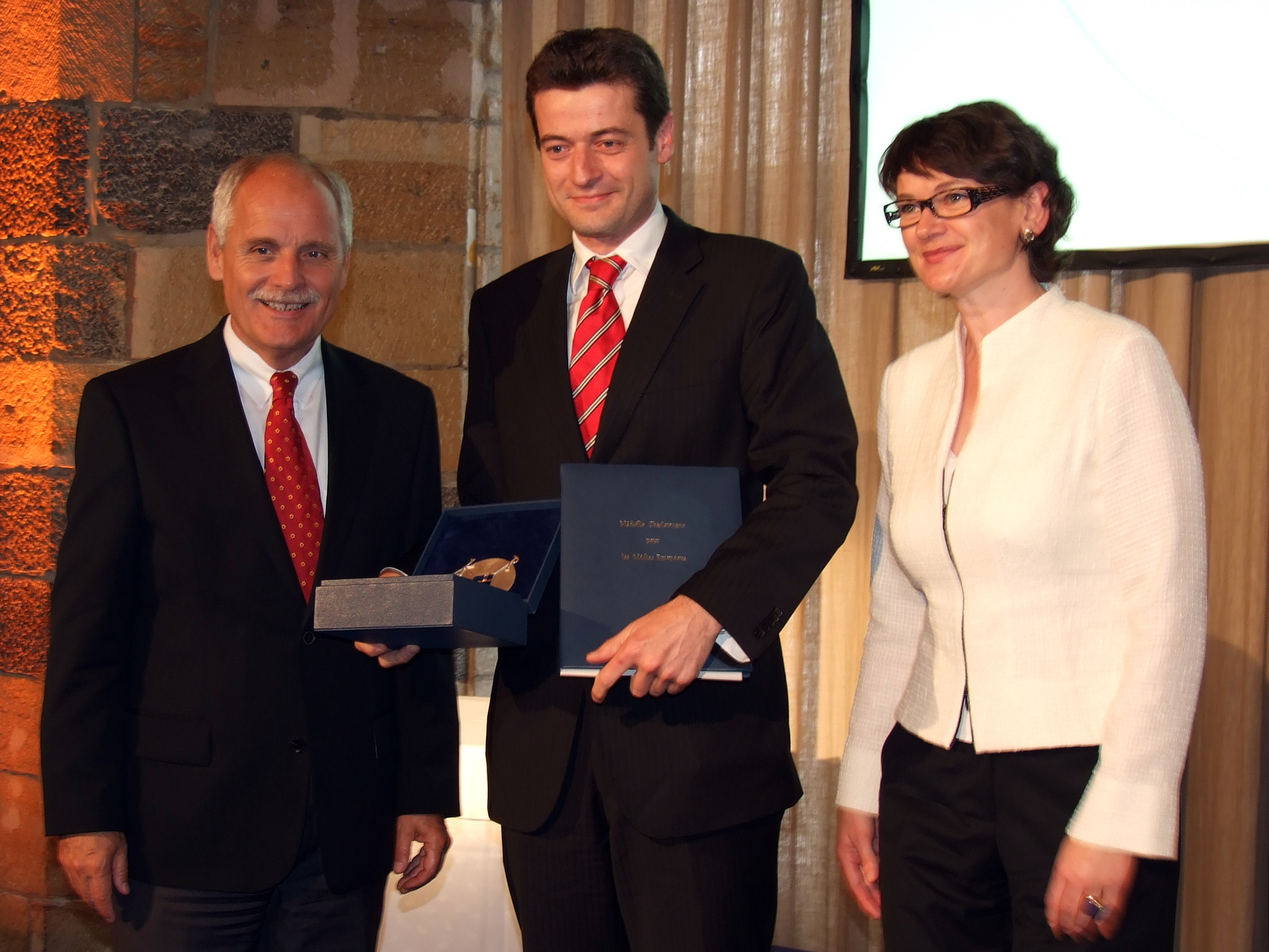 Verleihung der Karlsmedaille für europäische Medien an Reporter ohne Grenzen. Hier stellvertretend an Jean-François Julliard (mitte). Rechts im Bild: Frauke Gerlach (Vorsitzende des Kuratoriums Médaille Charlemagne e.V.). Links befindet sich Aachens Oberbürgermeister Jürgen Linden